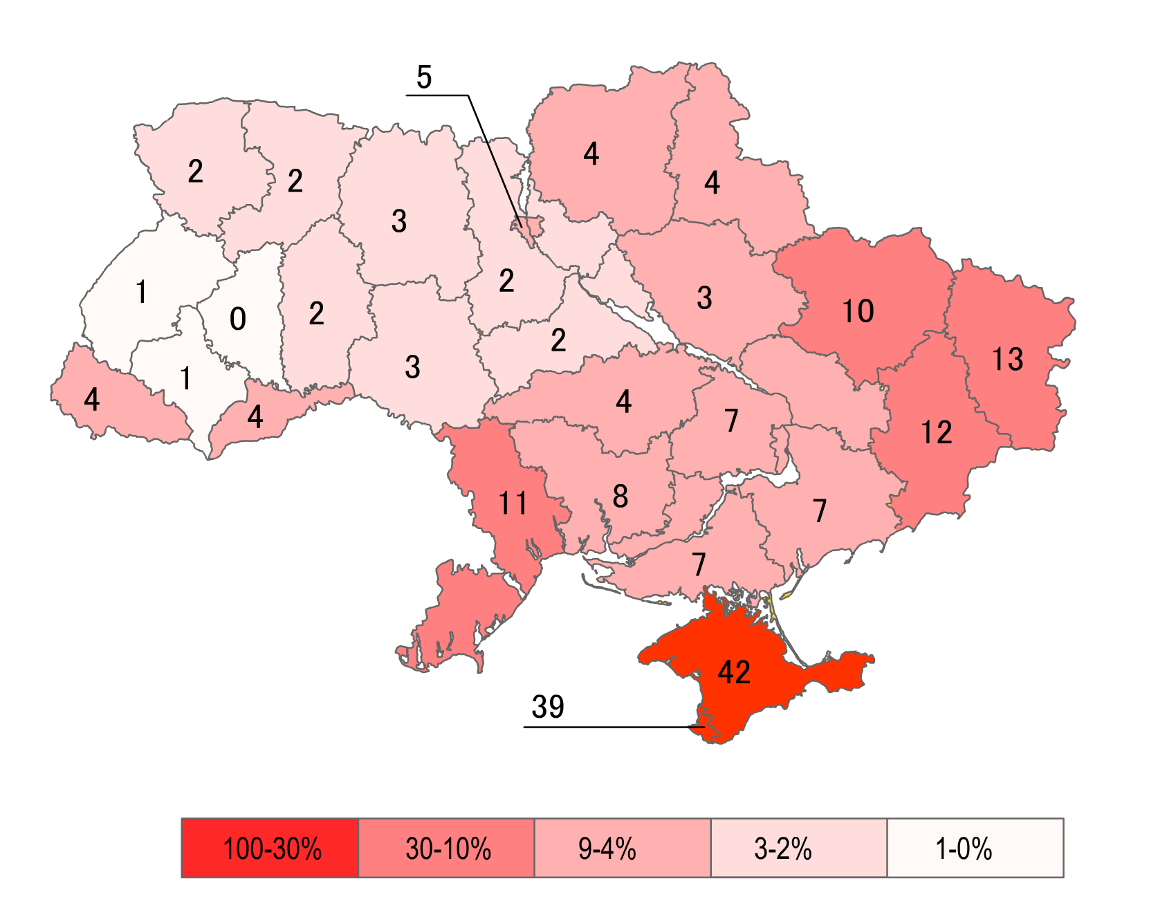 Референдум 1991: Карта. Соті відсотків опущені